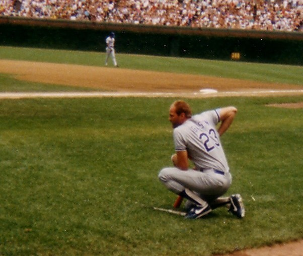 Kirk Gibson 17:47, 11 November 2007 . . Sacoo . . 602×508 (73 KB)